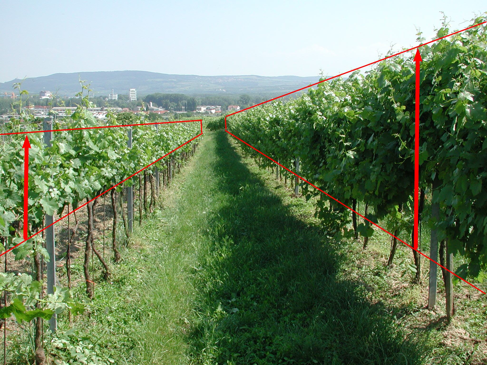 Laubwandflächenunterschied von verschiedenen Erziehungssystemen - Hochkultur und rechts Minimalschnitterziehung.